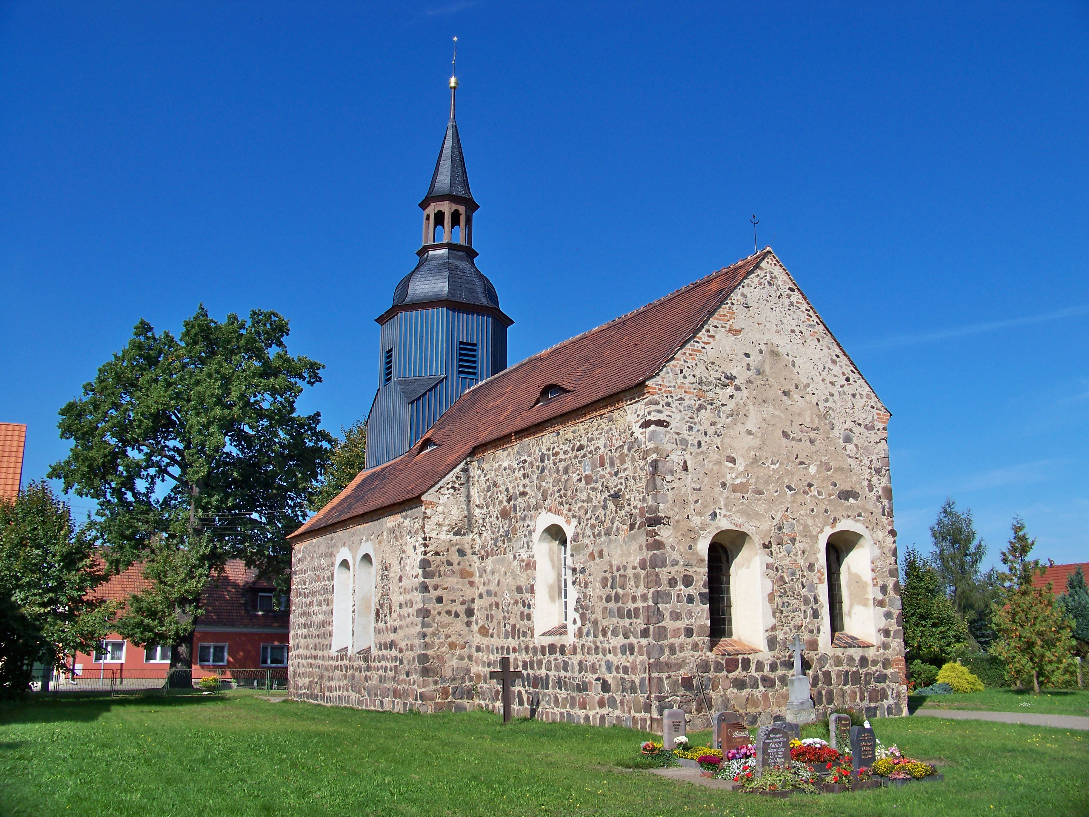 Kirche in Malitschkendorf bei Herzberg (Elster)